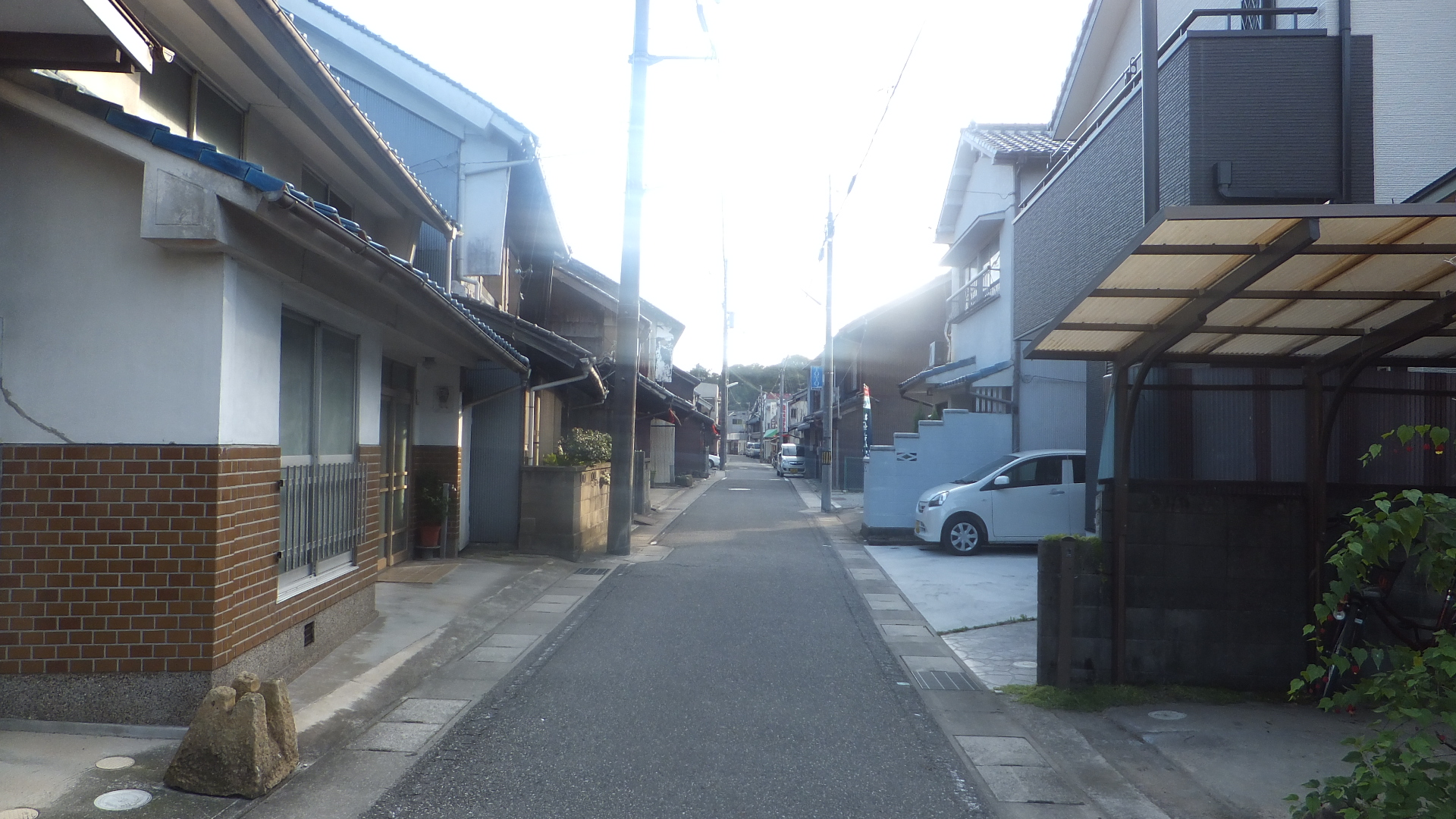 兵庫県三木市府内